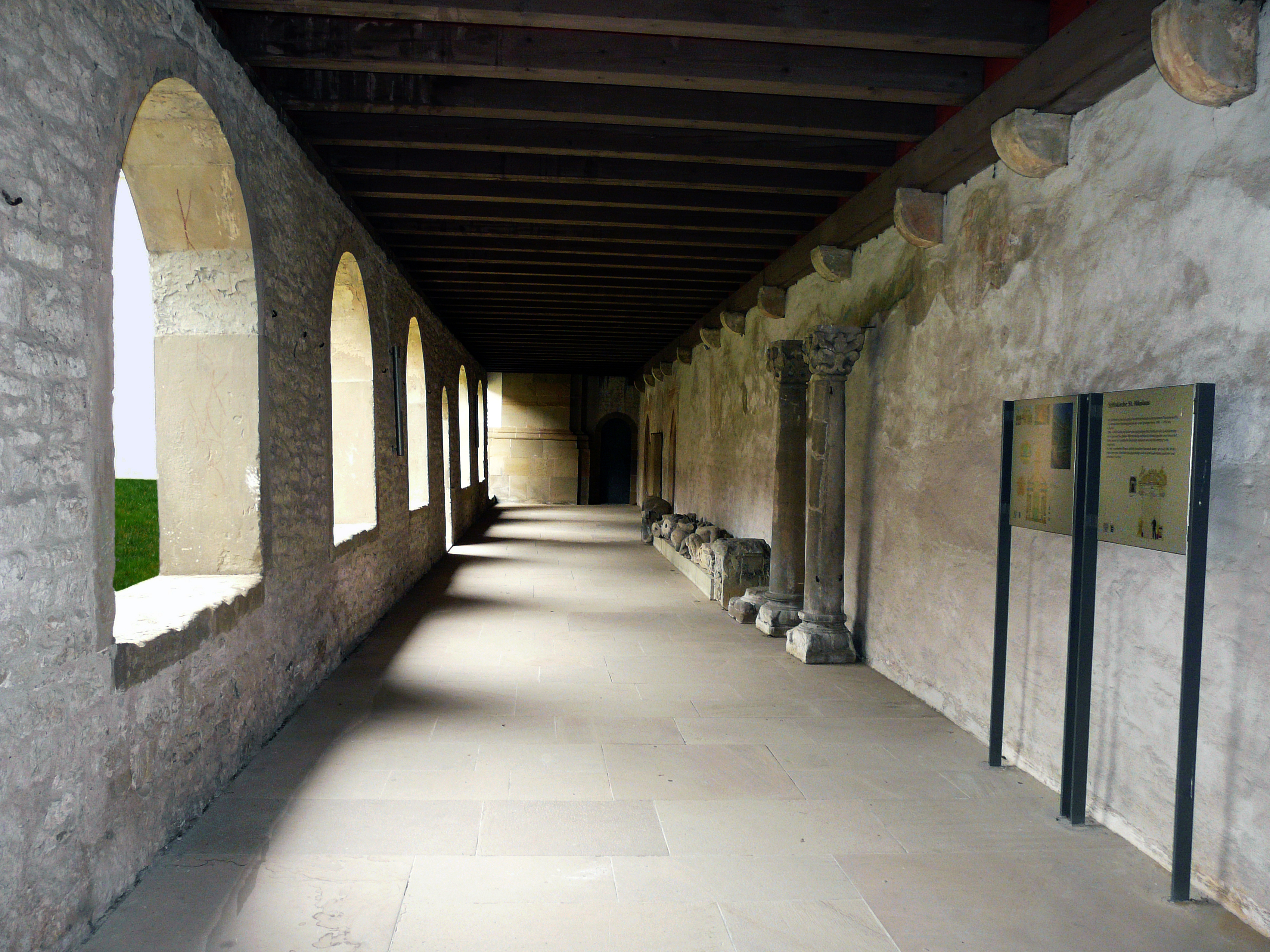 Галерея